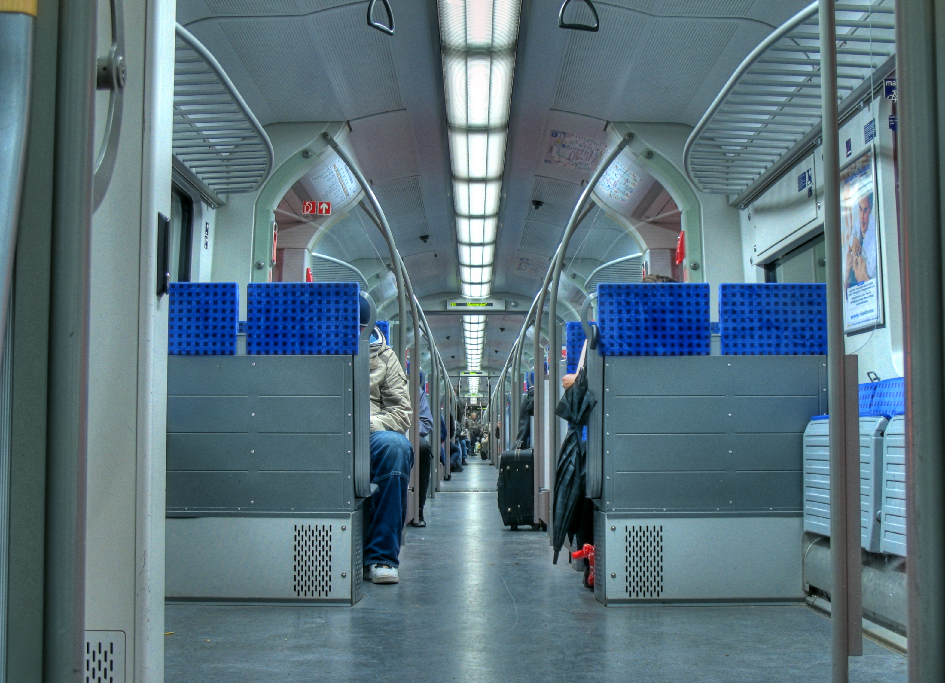 München, S-Bahn, Abteil mit Möglichkeit zur Unterbringung sperriger Gegenstände (z. B. Fahrräder, Kinderwägen), HDR-Aufnahme